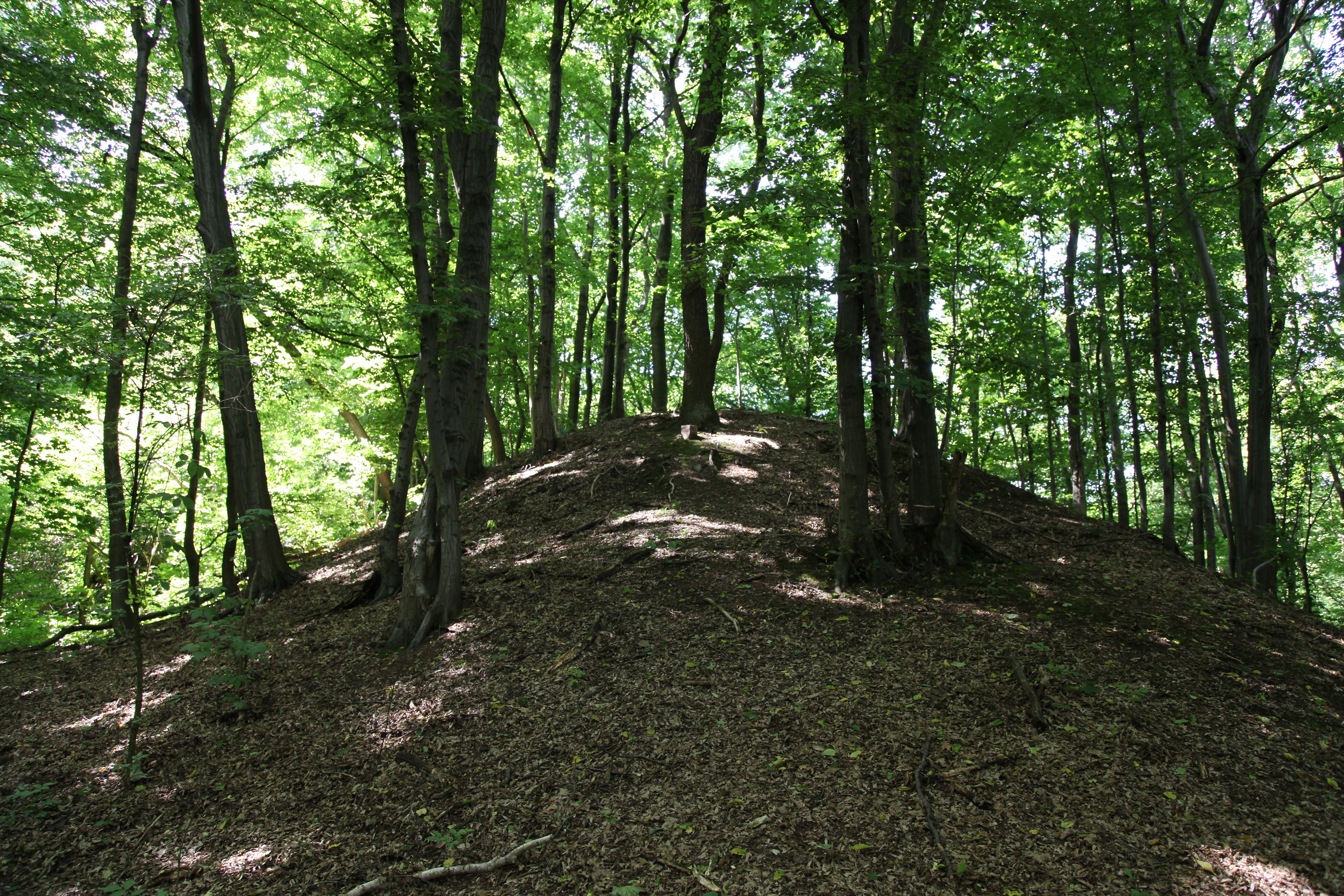 Alte Schanze oder Schwedenschanze in der Georgewitzer Skala in Löbau